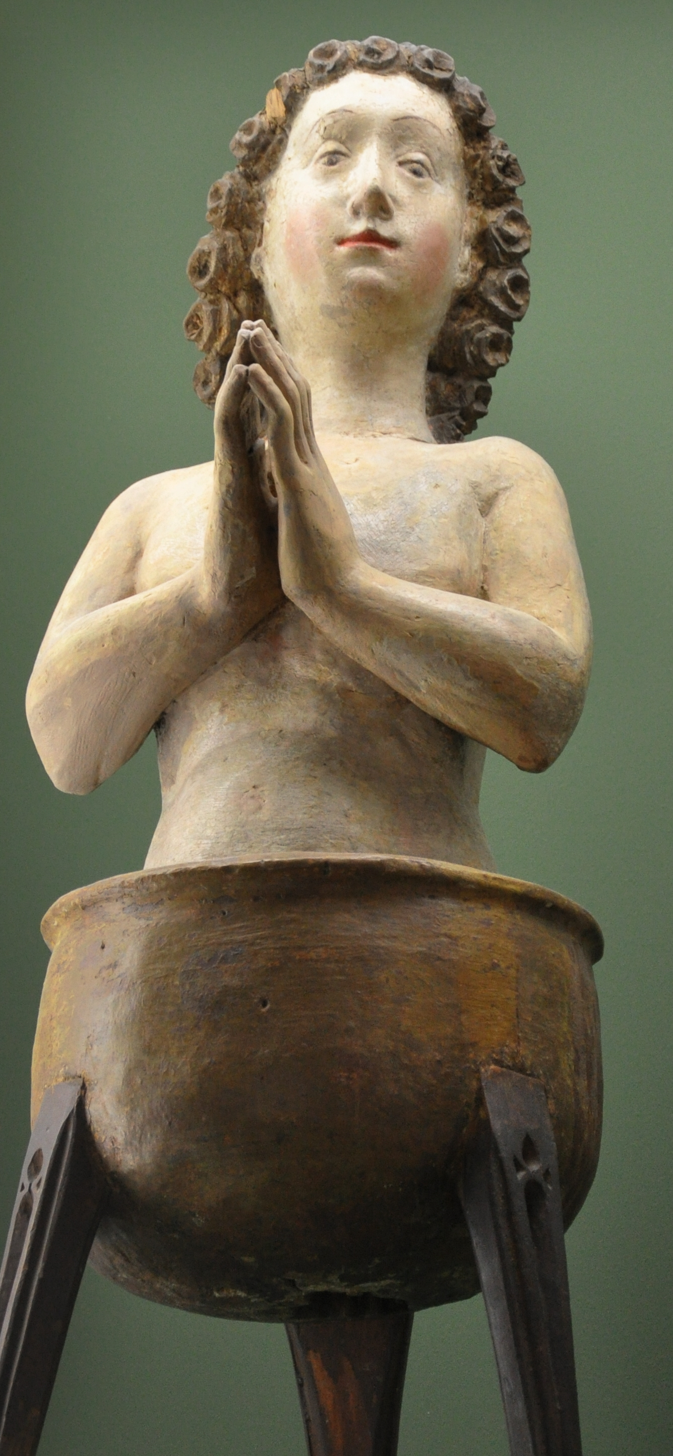 Hl. Veit im Kessel; Salzburg Museum